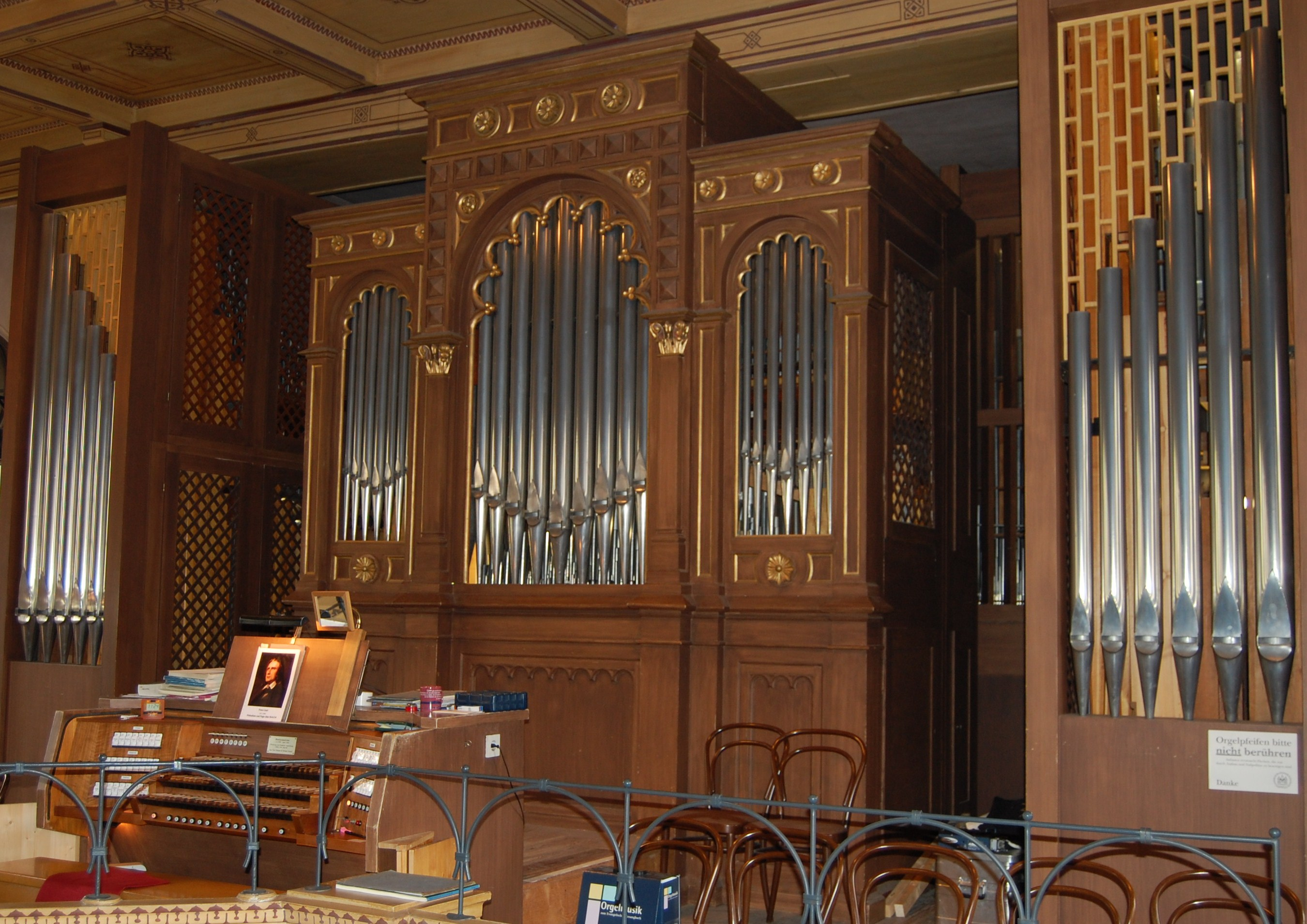 Steinmeyer-Orgel in der Erlöserkirche Bad Kissingen (2010)